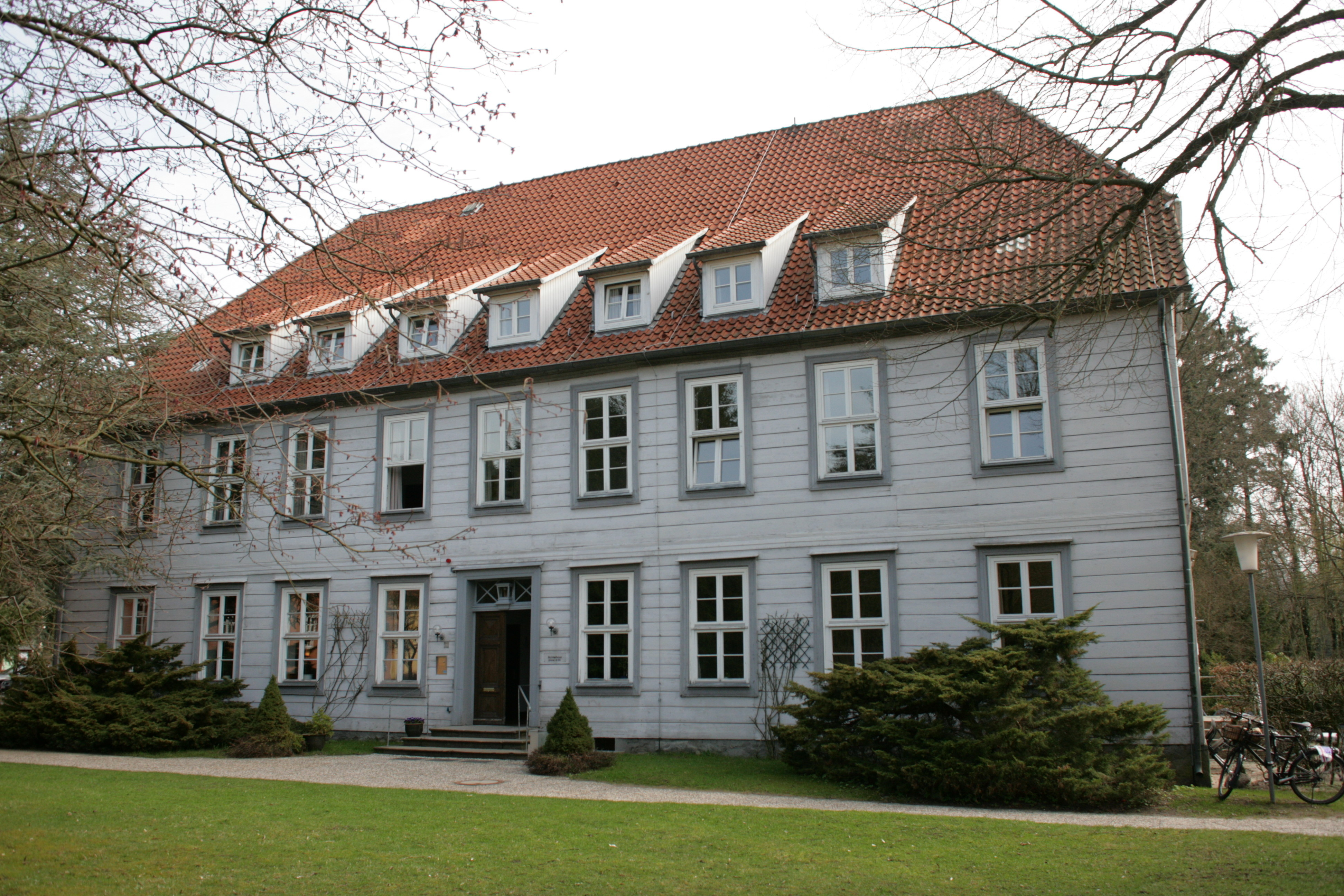 Gustav Stresemann Institut, Klosterweg in Medingen, Bad Bevensen